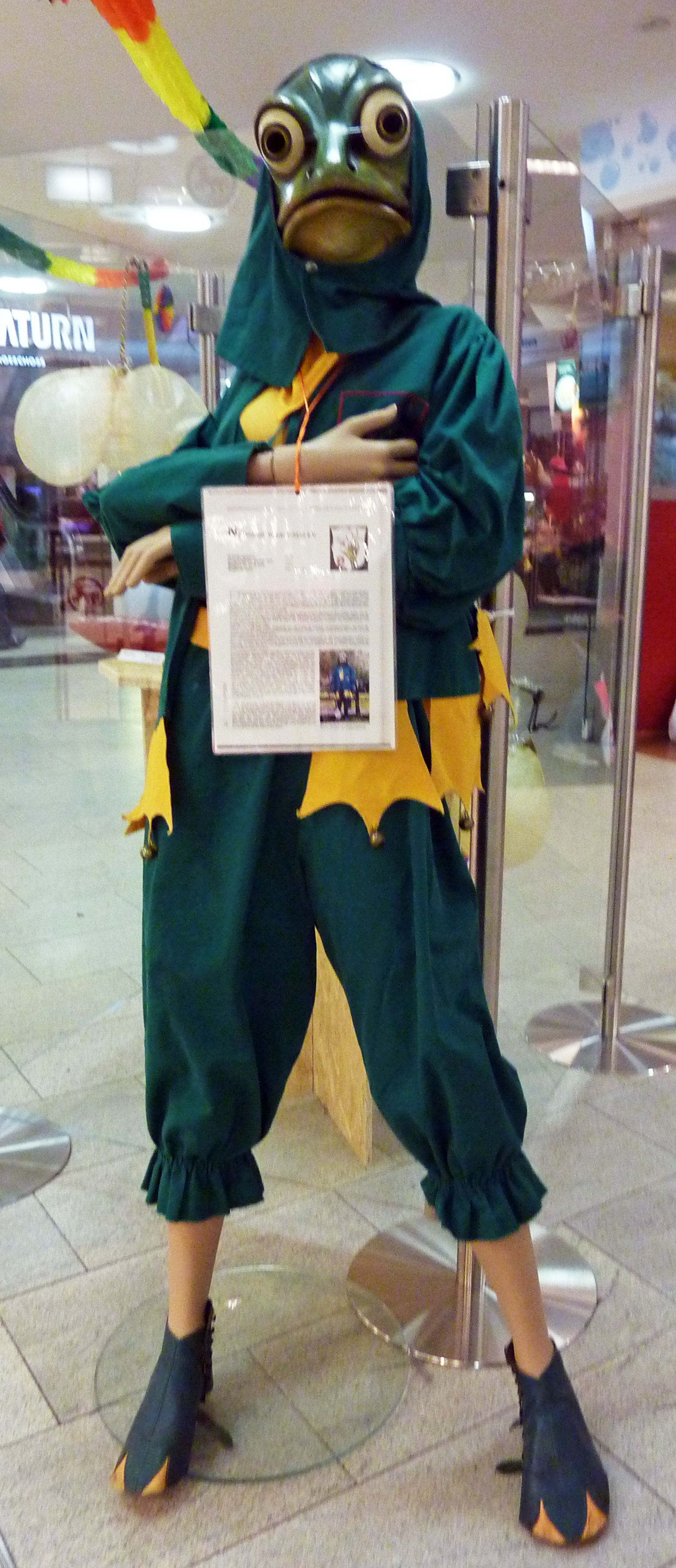 Häs der Narrenzunft Wierer Frösch e.V. Exponat aus der Sammlung Peter Scharte aus der Ortenau, vom 14. Januar bis 13. Februar 2013 im Einkaufszentrum Schwarzwald City (Freiburg) unter dem Titel „Narrenrequisiten - vielfältig und kreativ“ ausgestellt.